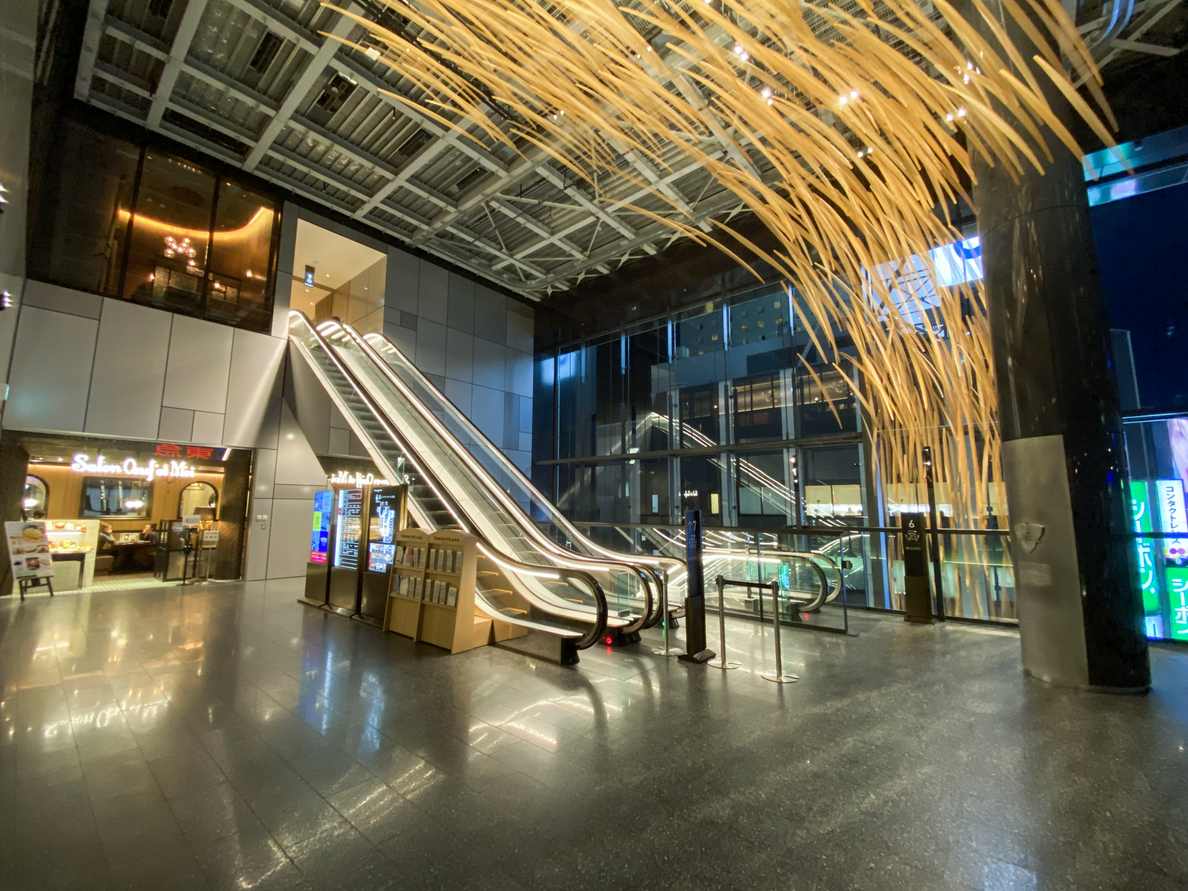 Tokyu Plaza Suibuya Level 6 Void1